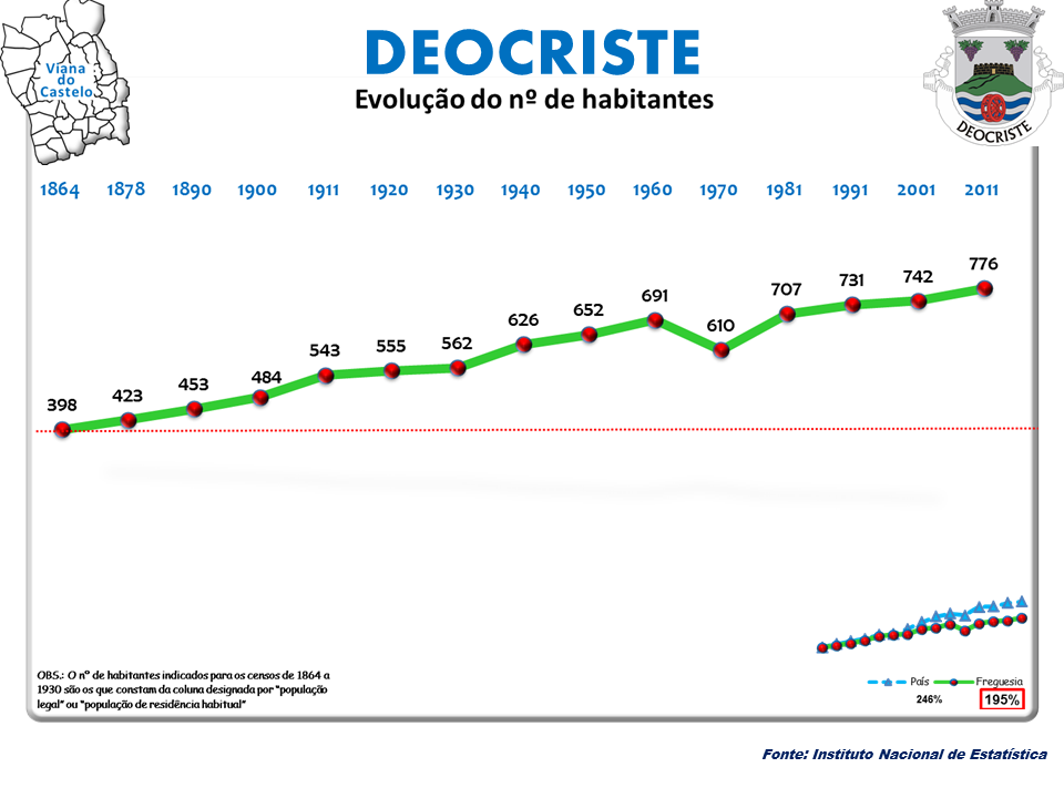 Censos 1864/2011